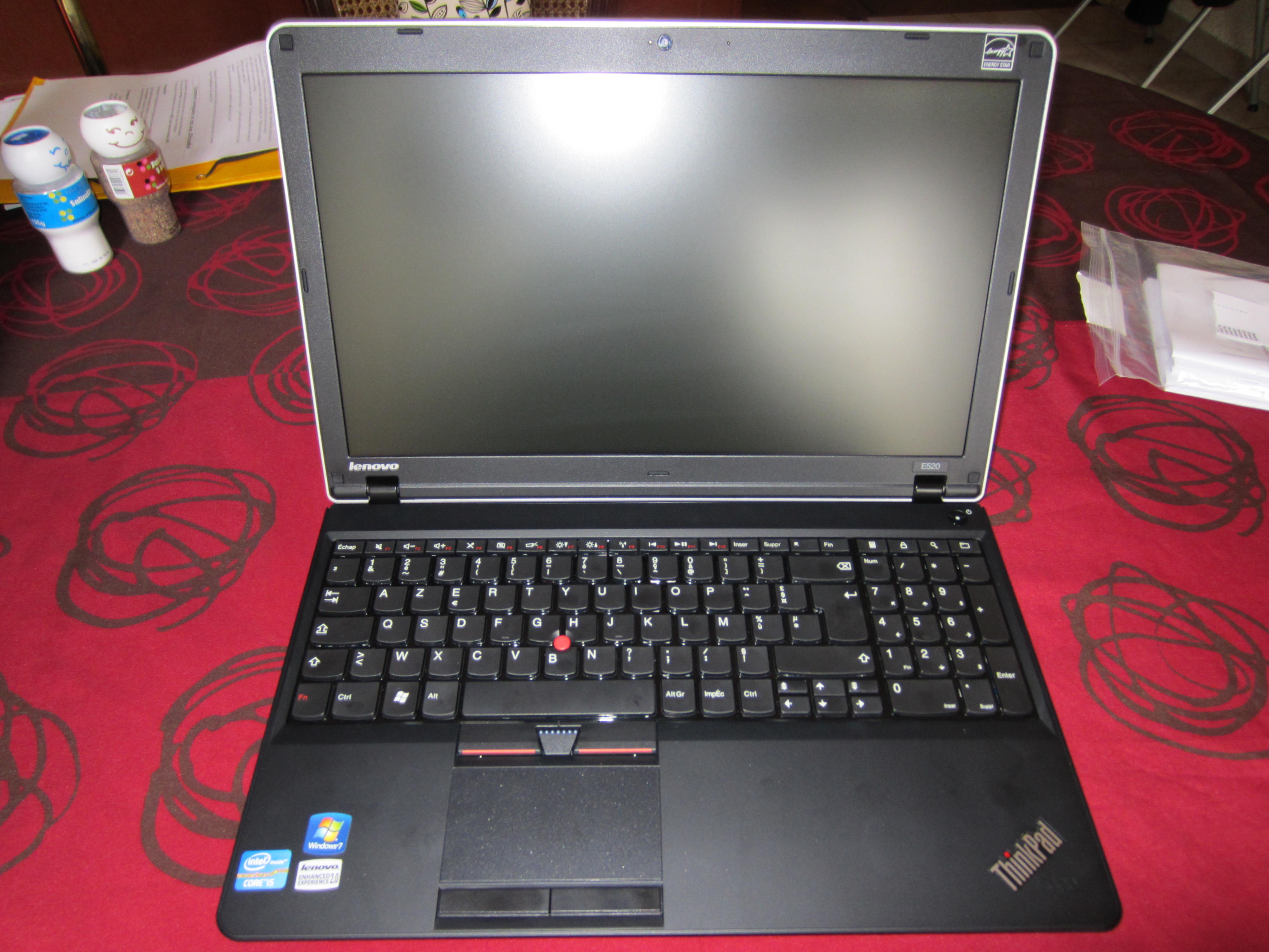 Photographie de l'ordinateur portable Lenovo ThinkPad E520